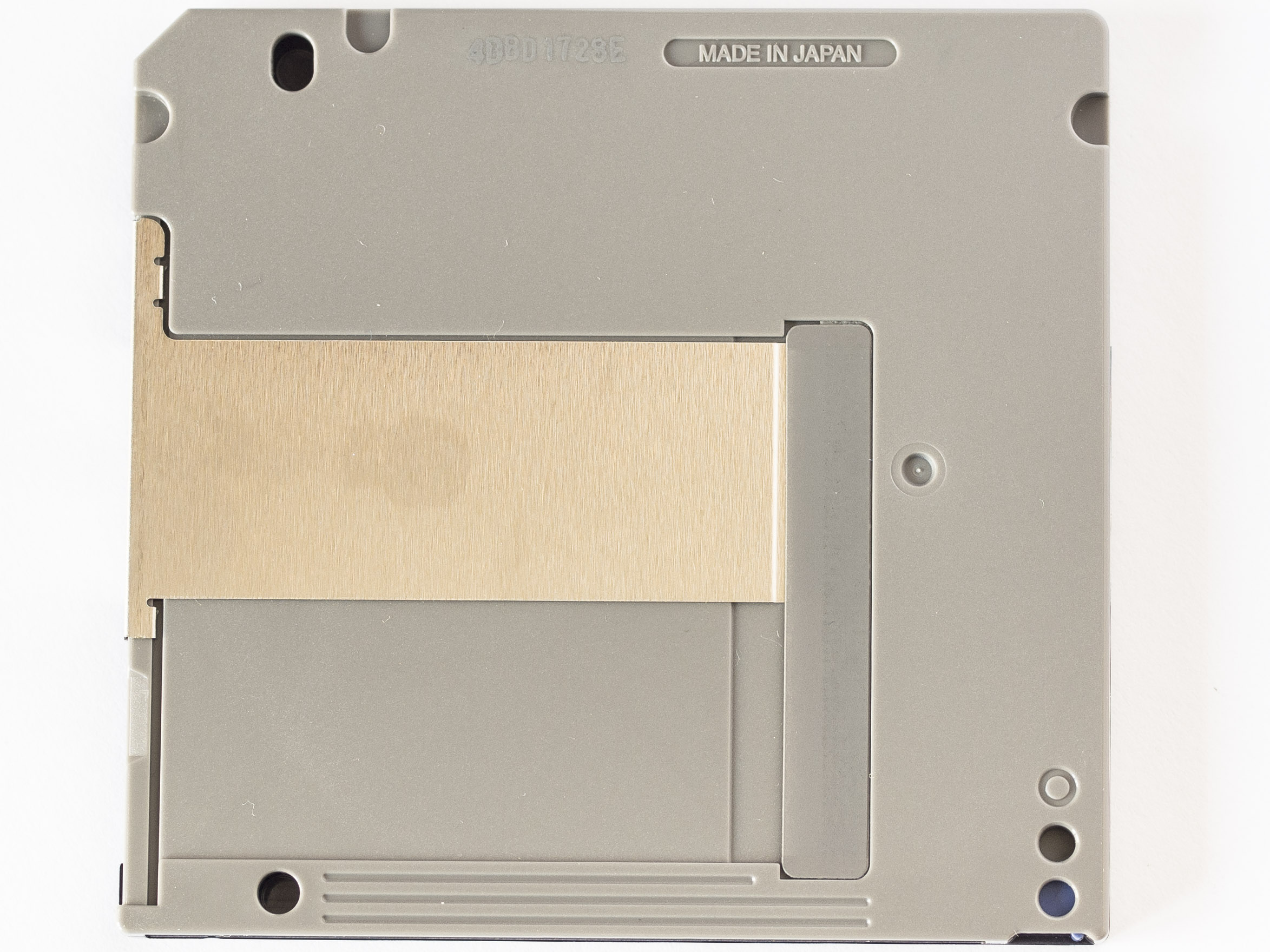 vista trasera de un minidisc tipo MD data; observar la pestaña metálica deslizante, es más grande que en un minidisc convencional de audio